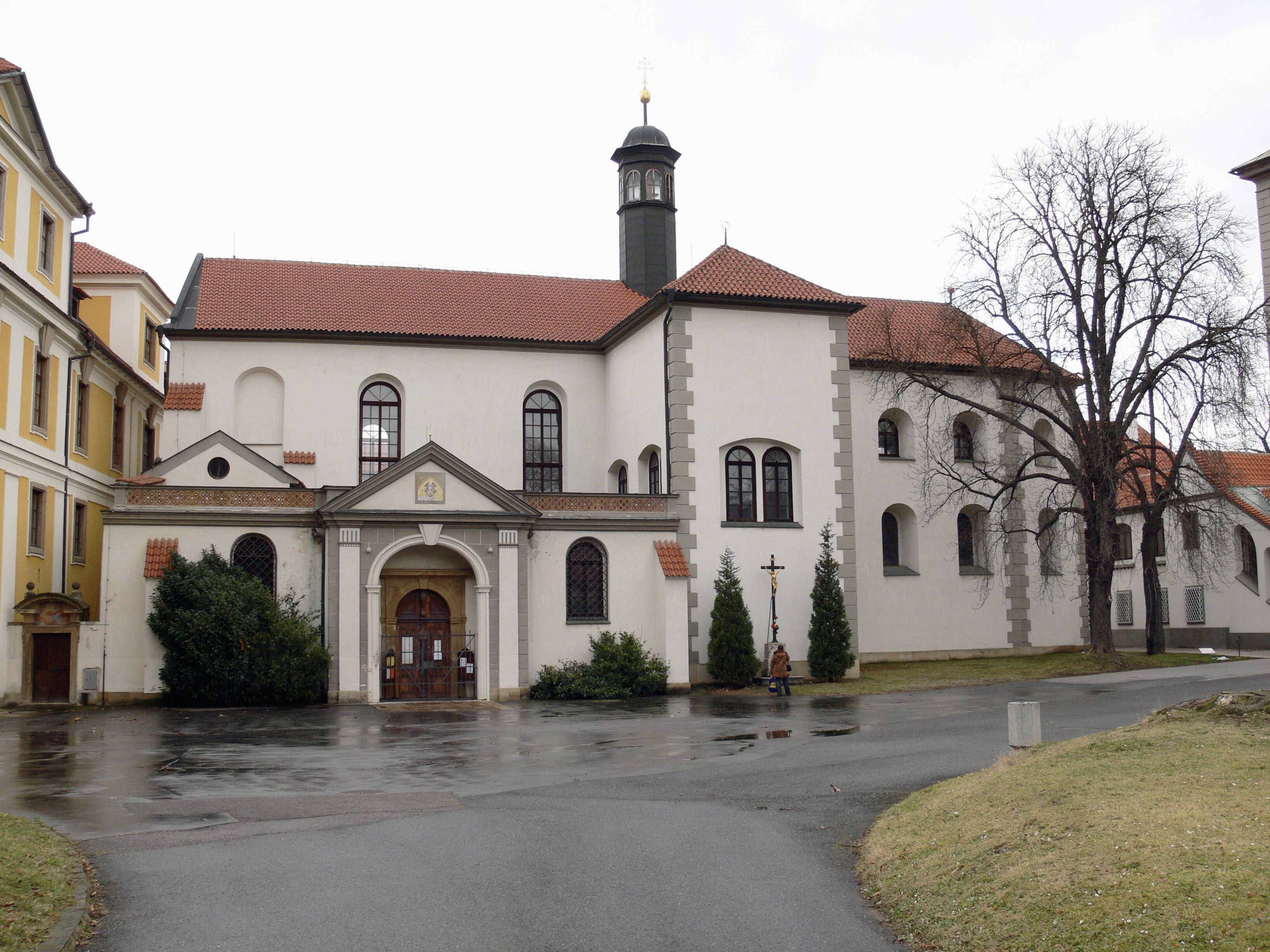 Kostel sv. Jakuba Většího od jihu